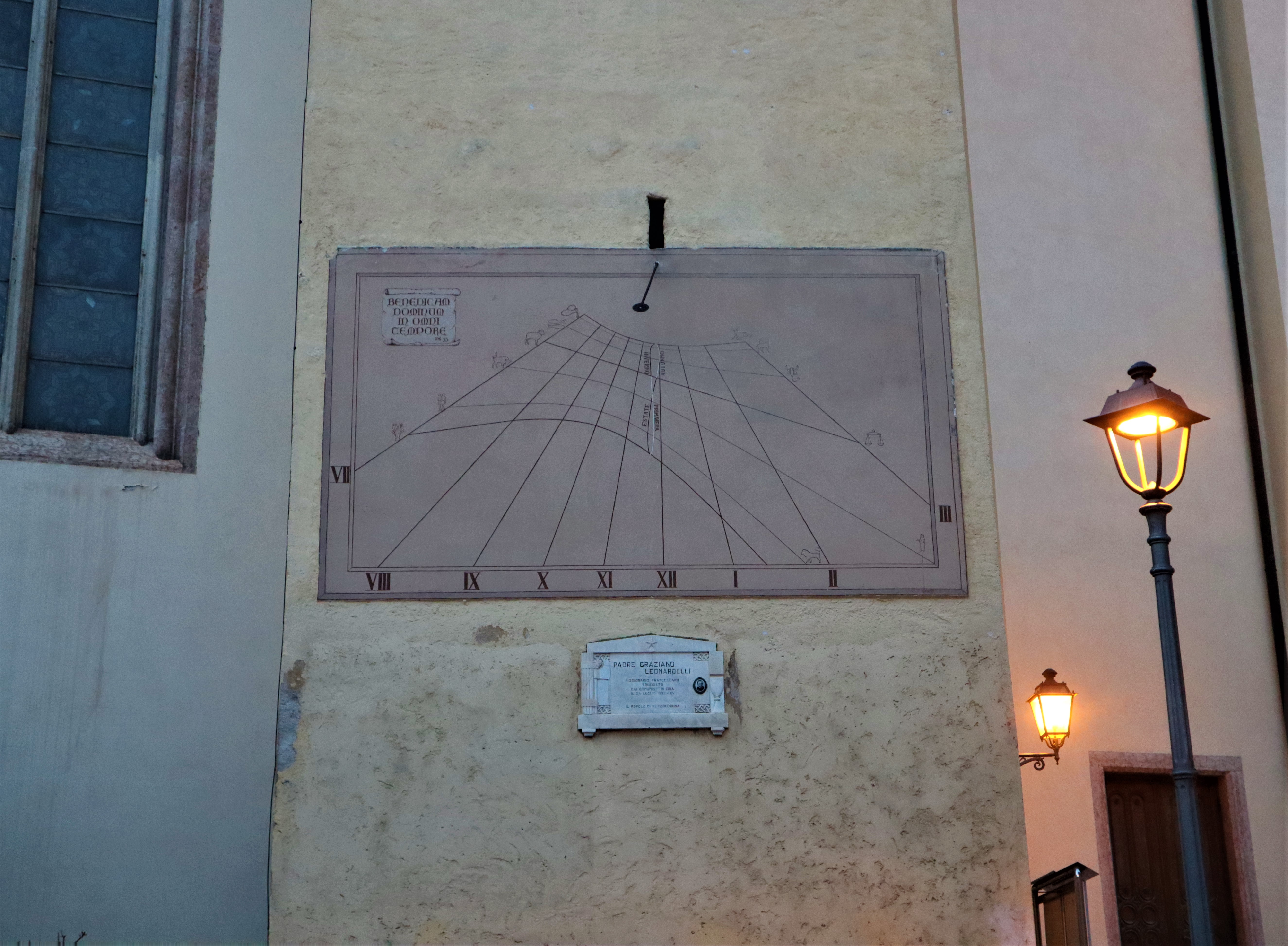 Meridiana ed epigrafe a ricordo del missionario padre Graziano Leonardelli ucciso nel 1937 sulla torre campanaria